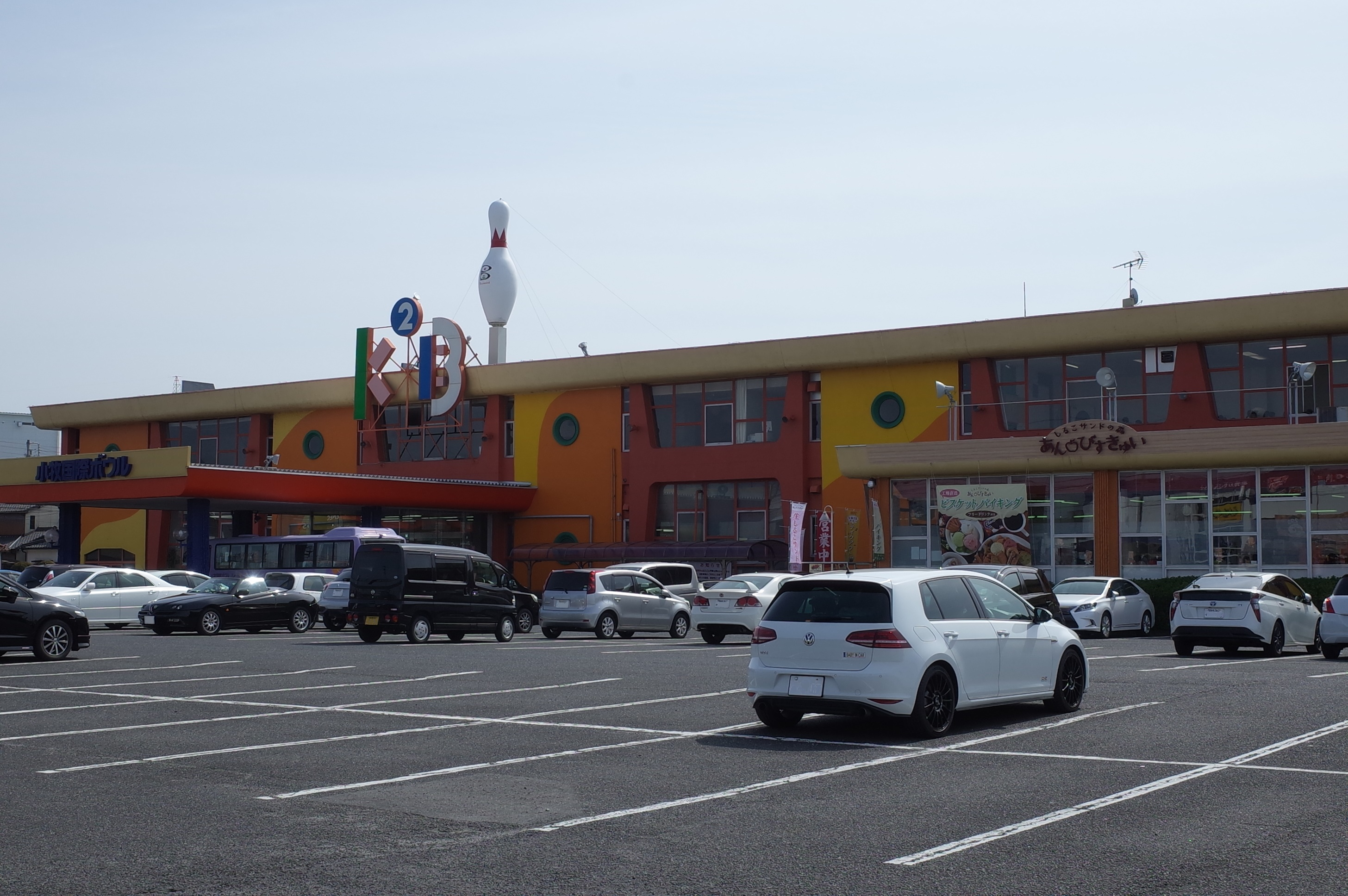 愛知県小牧市にあるボウリング場、小牧国際ボウル外観